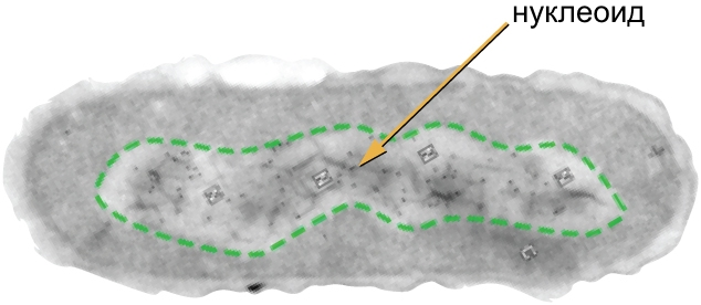 Нуклеоид.